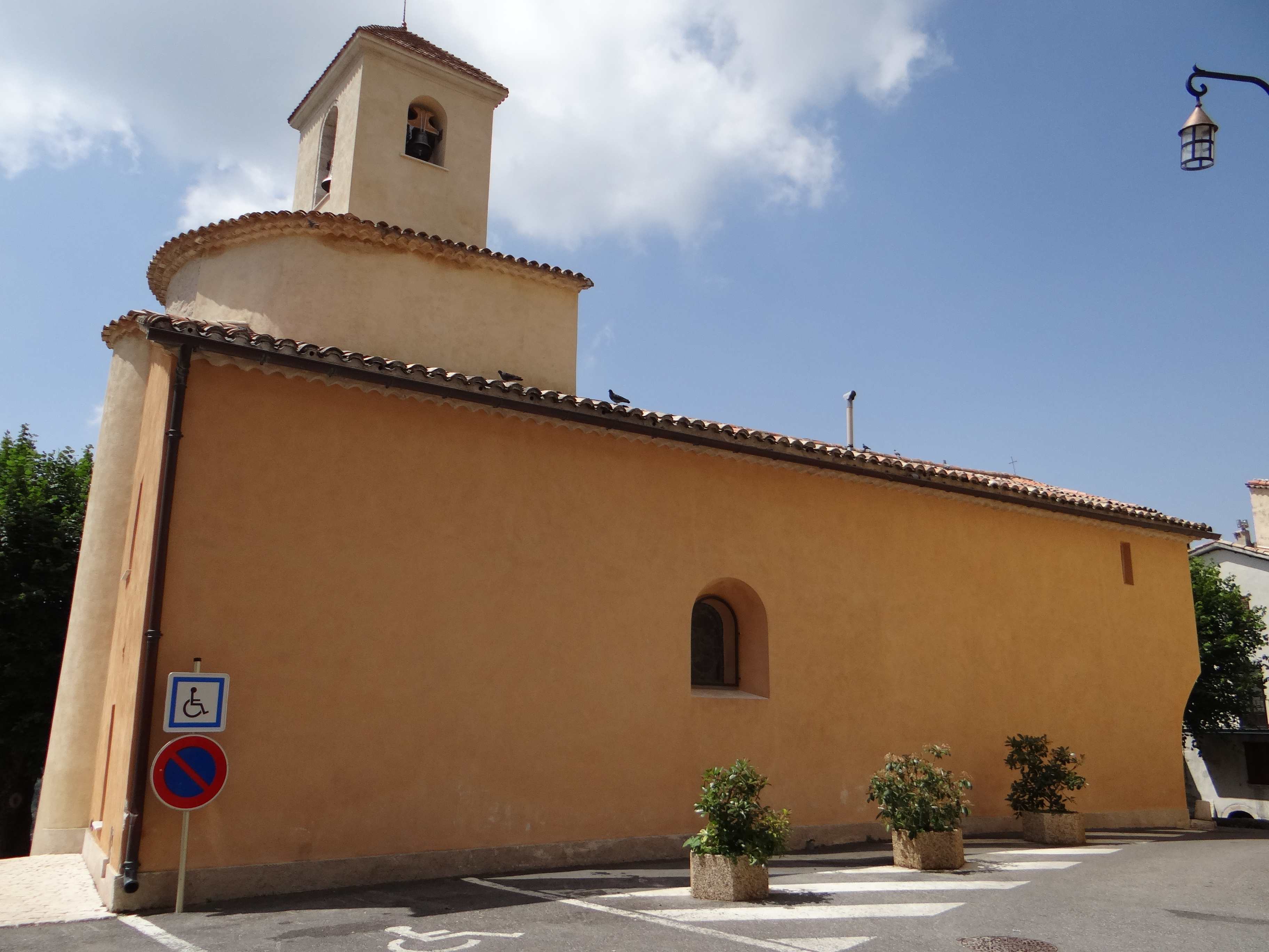 Coursegoules - Église Sainte-Marie-Madeleine - Ensemble côté nord